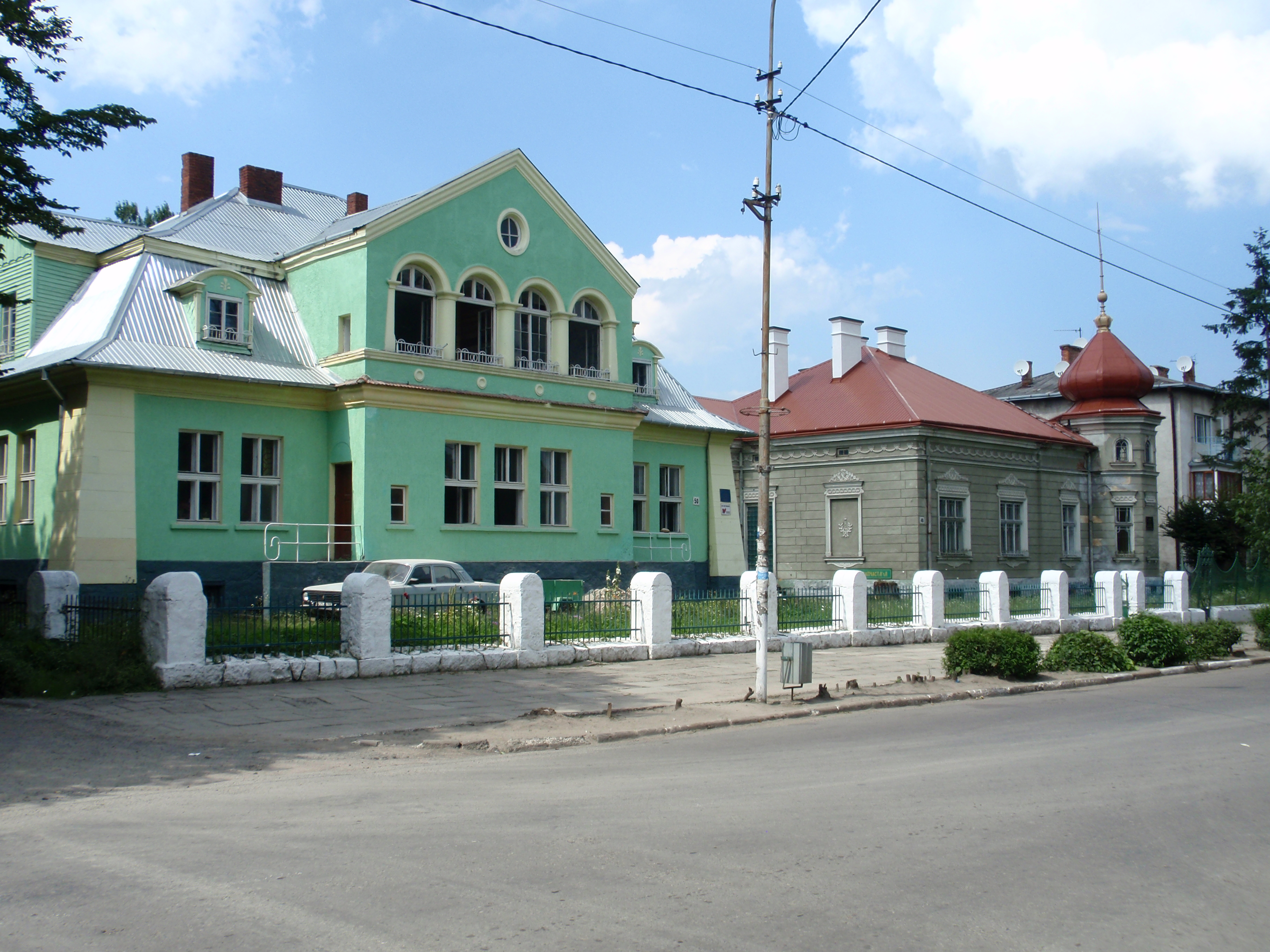 Будинки колишніх сколівських магнатів